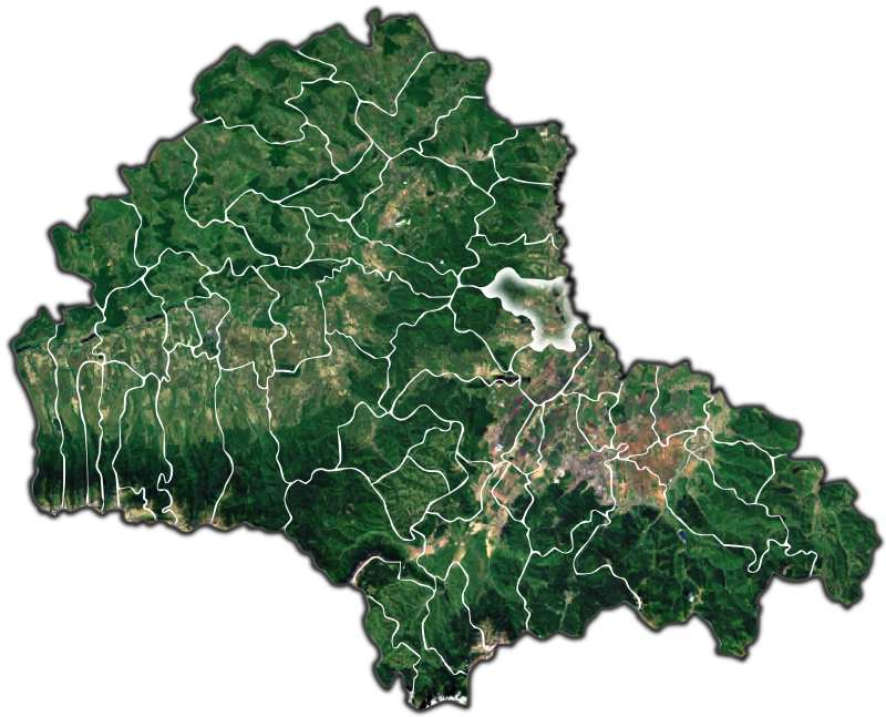 Feldioara jud Brasov